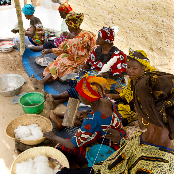 Fileuses de coton dans la région d'Oury This is an image of Cultural Fashion or Adornment from Burkina Faso